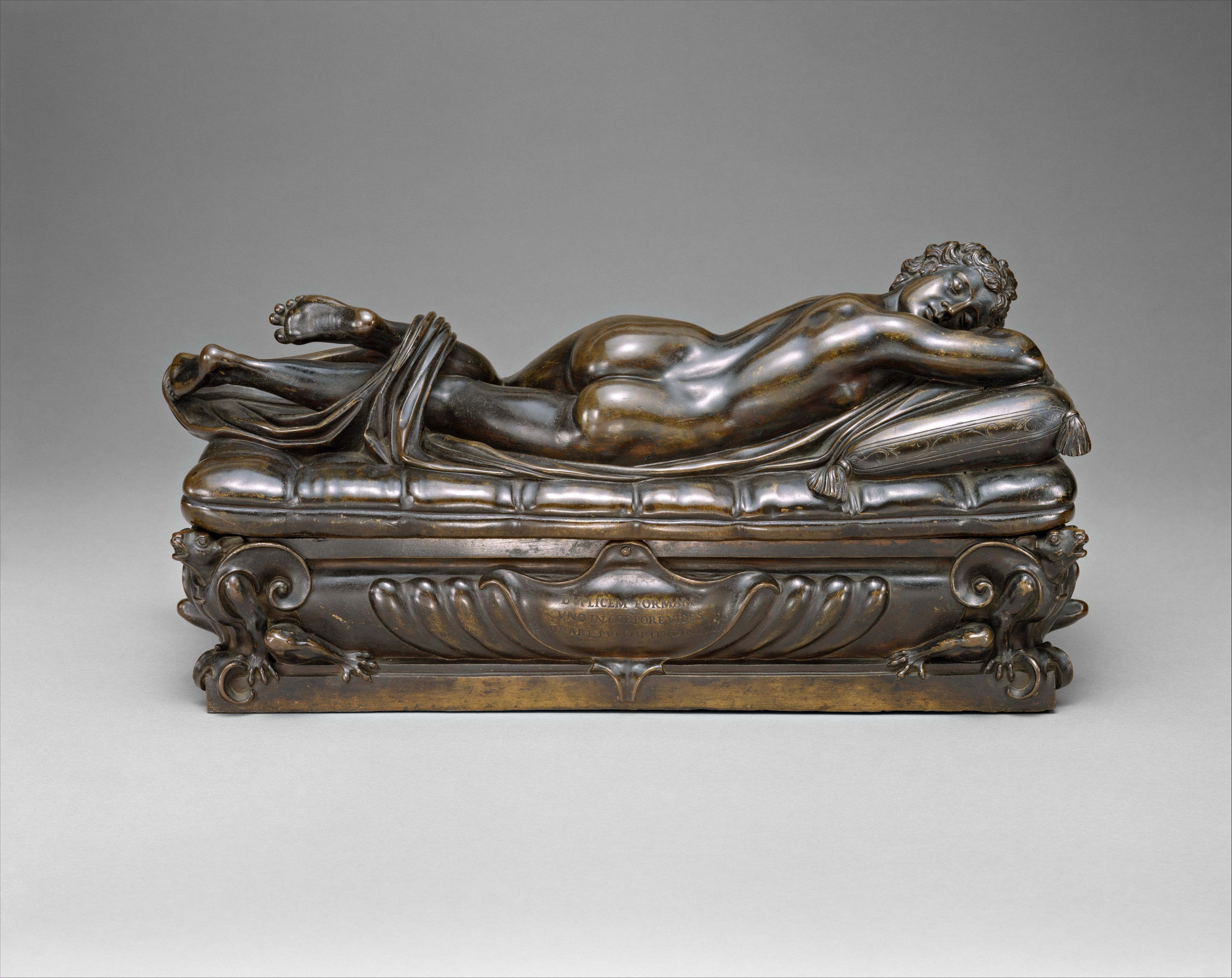 Italian, Florence; Statuette; Sculpture-Bronze